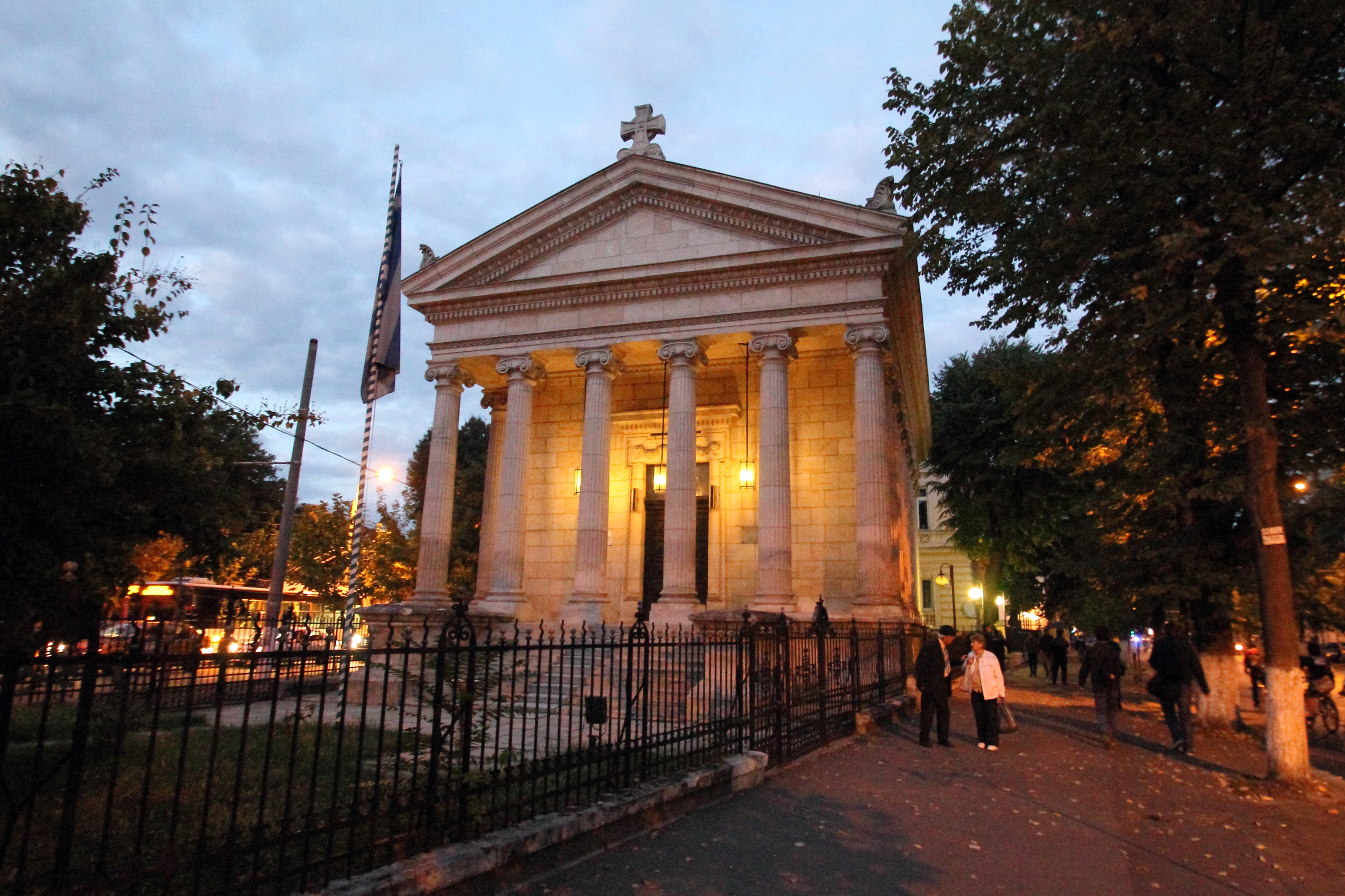 Biserica "Buna Vestire" Adresa: Bd. Protopopescu Pache 1-3 sector 2